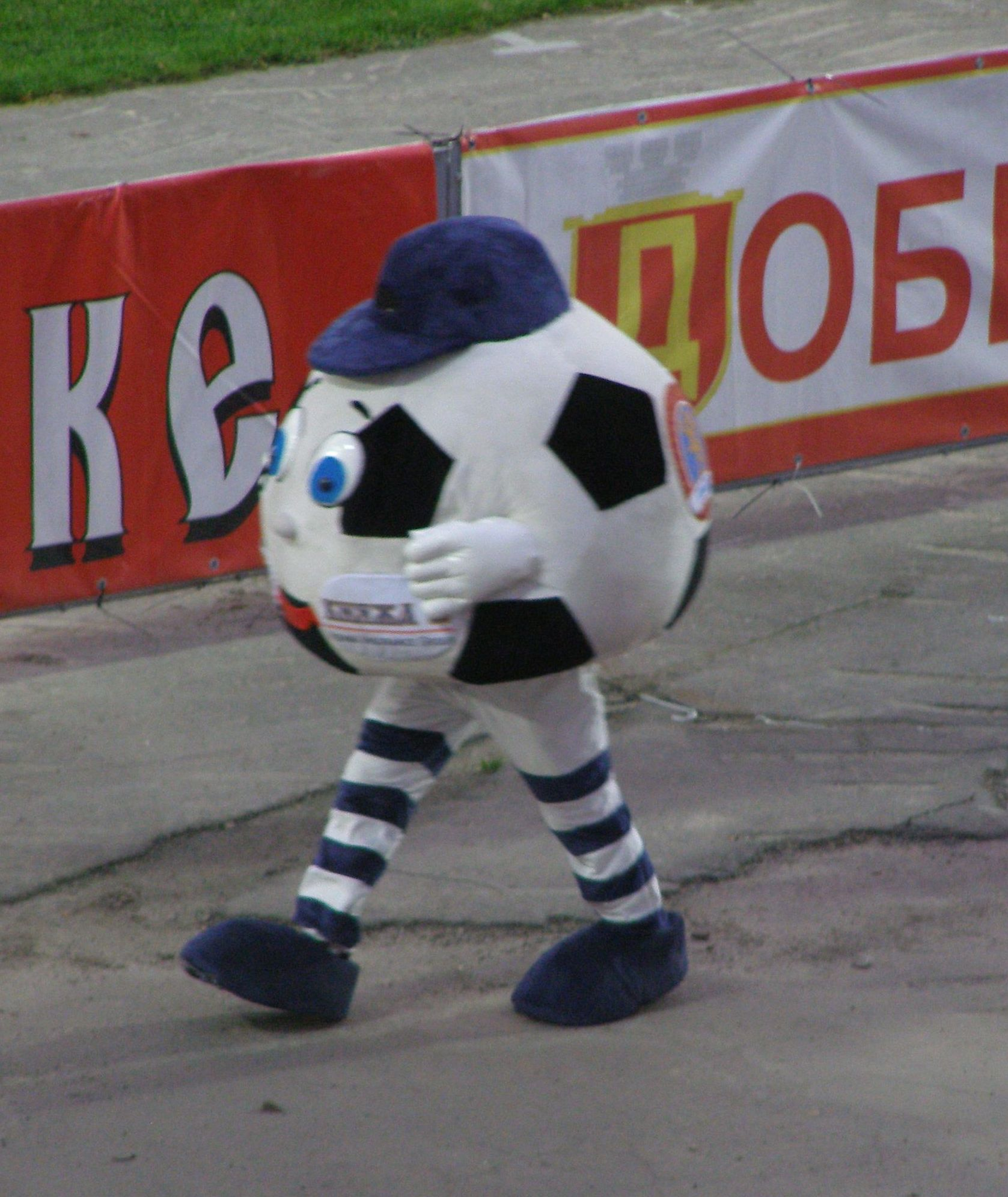 М'ячик - маскотка ФК Львів